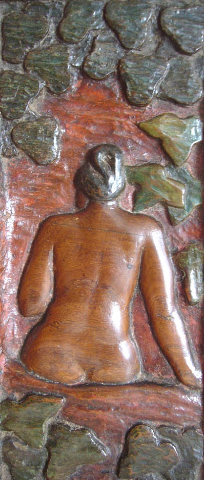 Ernest Ponthier de Chamaillard : Baigneuse de dos (sculpture, bas-relief)